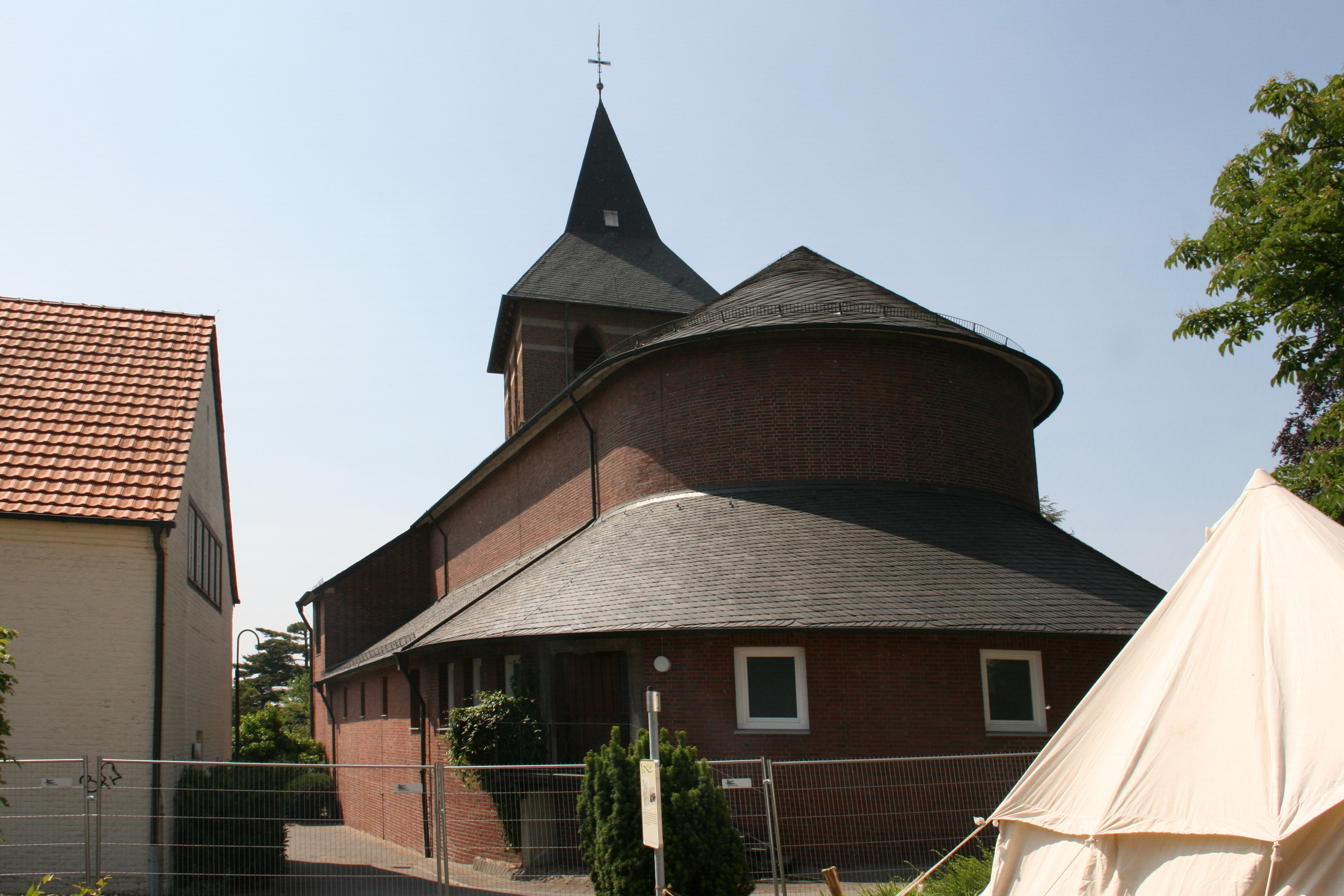 Propsteikirche St. Georg, Stiftsplatz in Wassenberg